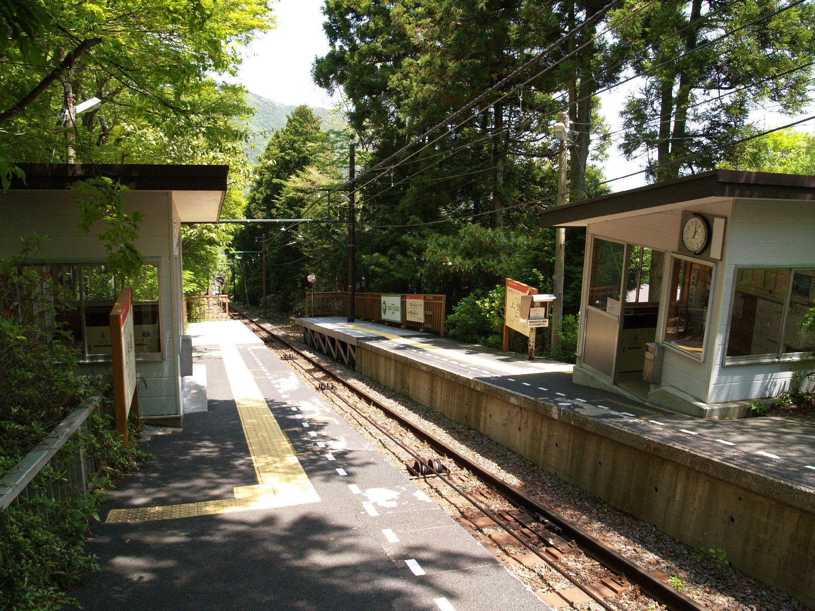 上強羅駅ホーム